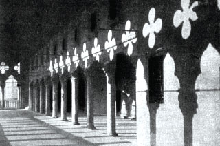 documentario Il Palazzo dei Dogi - Pasinetti 1947 - prod. Filmeuropa